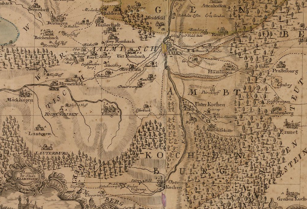 Oberkochen in: Karte der Fürstpropstei Ellwangen von Arnold Friedrich Prahl (1746). Unten im Kartenausschnitt ist Oberkochen mit Prahlscher Schlackenwäsche, Kocherursprung und Ölmühle am Ursprung des Roten Kochers dargestellt.